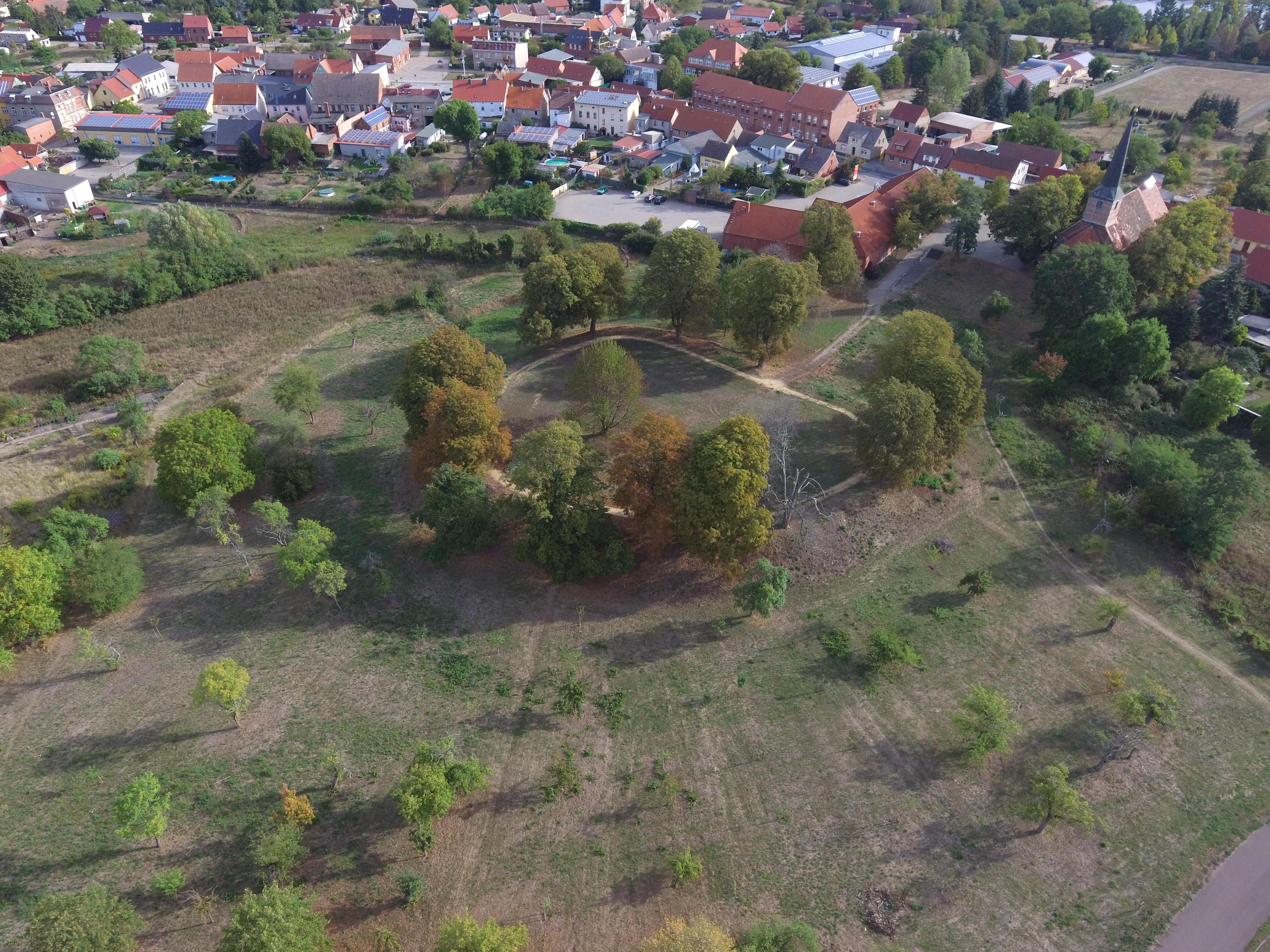 Luftbild des Burgstalls der Burg in Jerichow